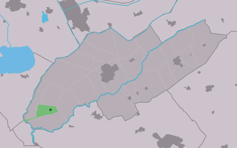 Kaartsje fan himrik fan Skerpenseel